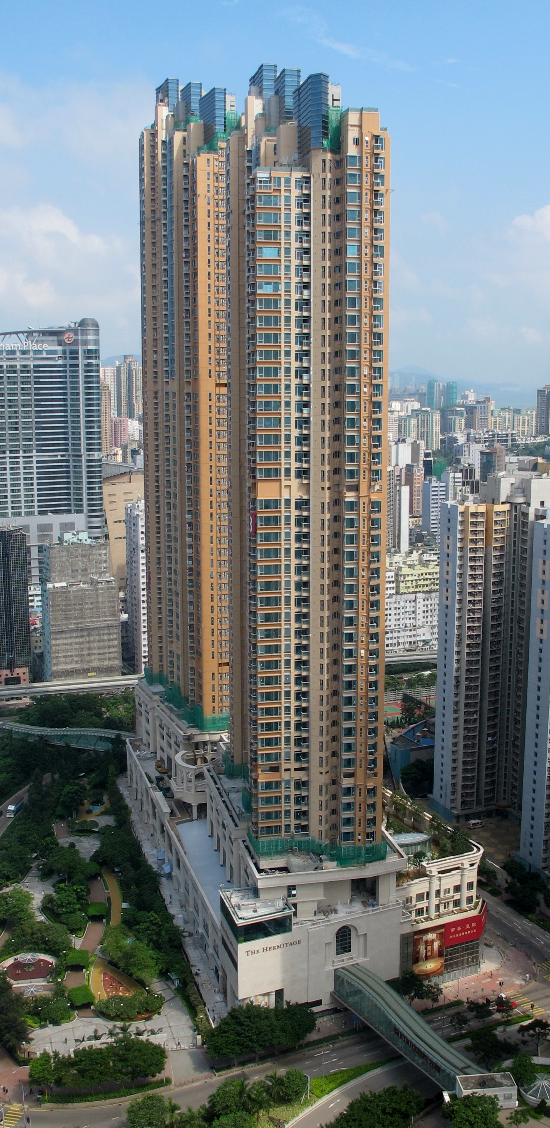 THe Hermitage 帝峰·皇殿